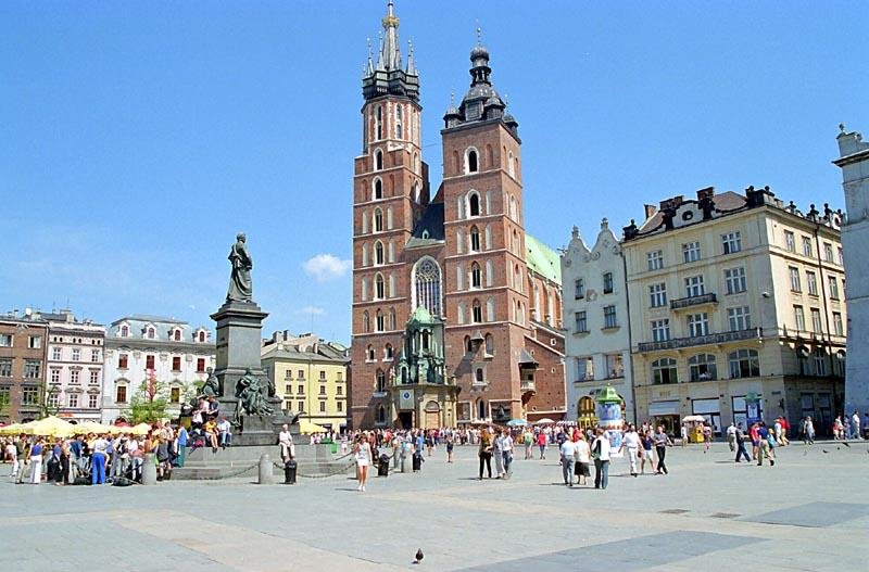 Krakow (Poland) Market Square